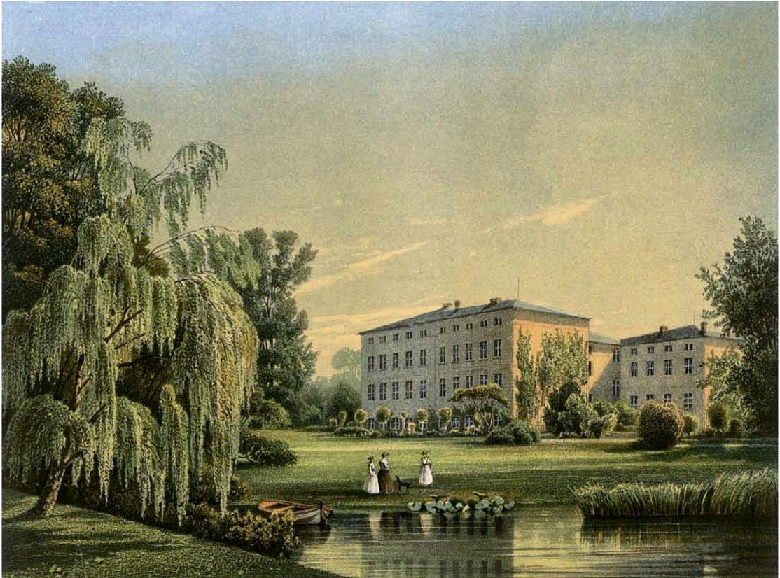 Herrenhaus in Schloss Gadow